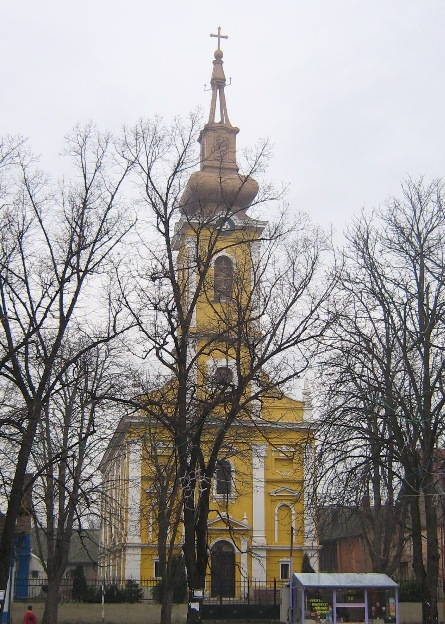 Румунска православна црква у Ковину. Author:JustUser